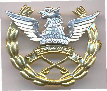 پاکستان آرمی ایویشن